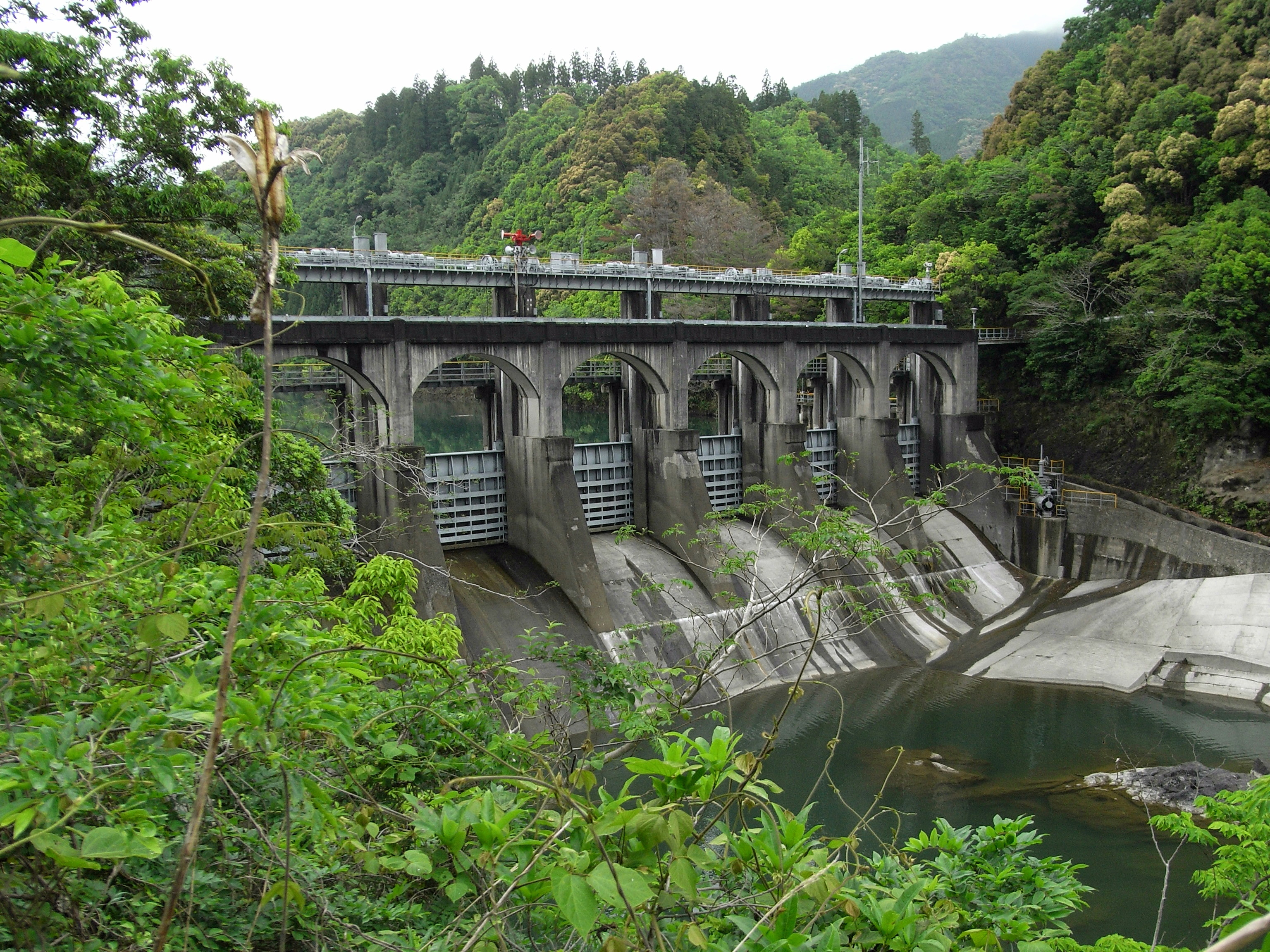 西郷ダム（宮崎県・耳川。九州電力株式会社管理）